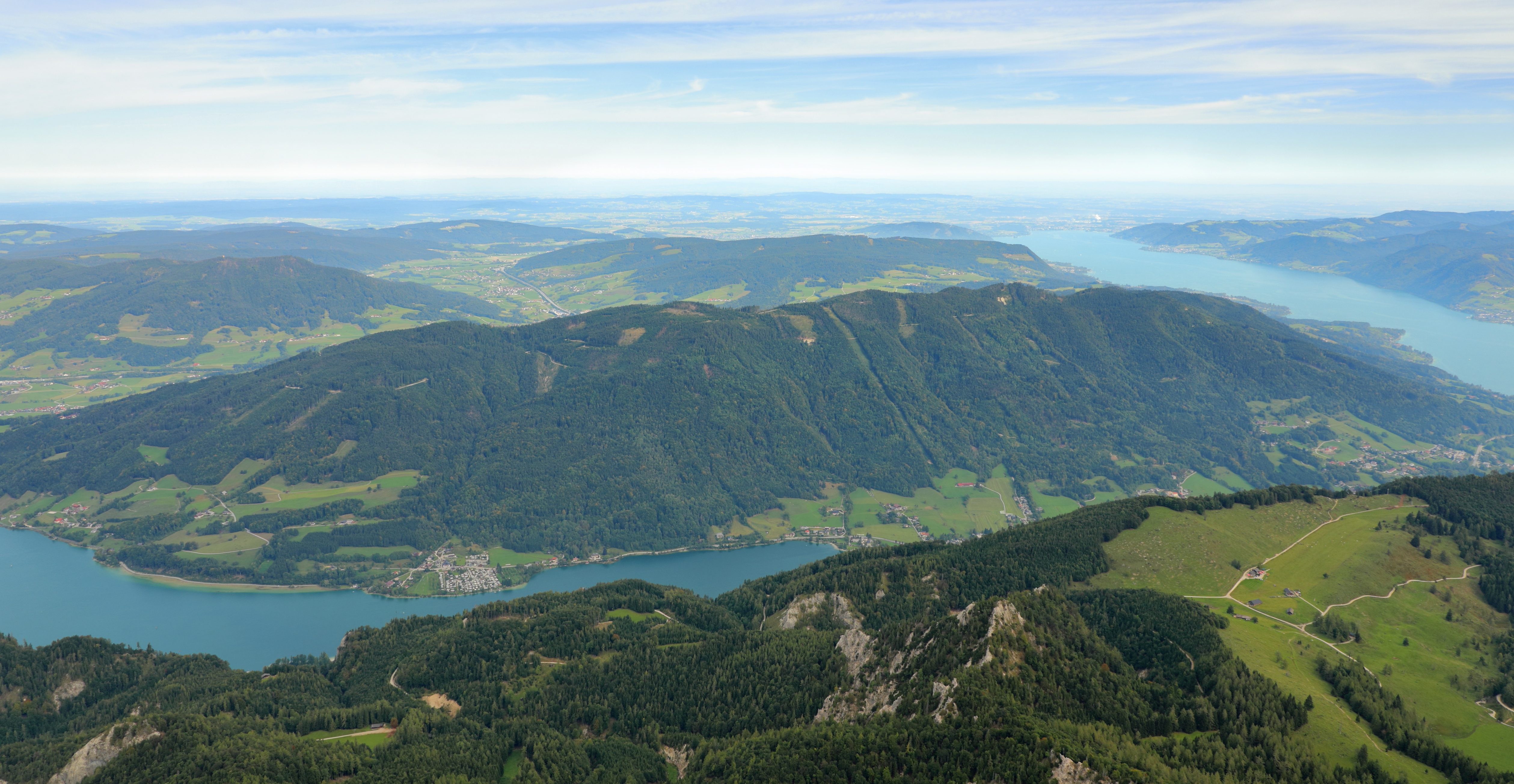 Blick vom Schafberg auf den Höhenzug „Hochplett“ bzw. in Richtung Norden mit links im Vordergrund dem Mondsee und rechts im Hintergrund dem Attersee.Die höchste Erhebung des Höhenzuges ist die Hochplettspitze mit 1134 m. Der südliche und östliche Teil des Höhenzuges befindet sich auf dem Gemeindegebiet von Unterach am Attersee, der westliche auf dem Gemeindegebiet von Innerschwand am Mondsee und der nördliche auf dem Gemeindegebiet von Oberwang.